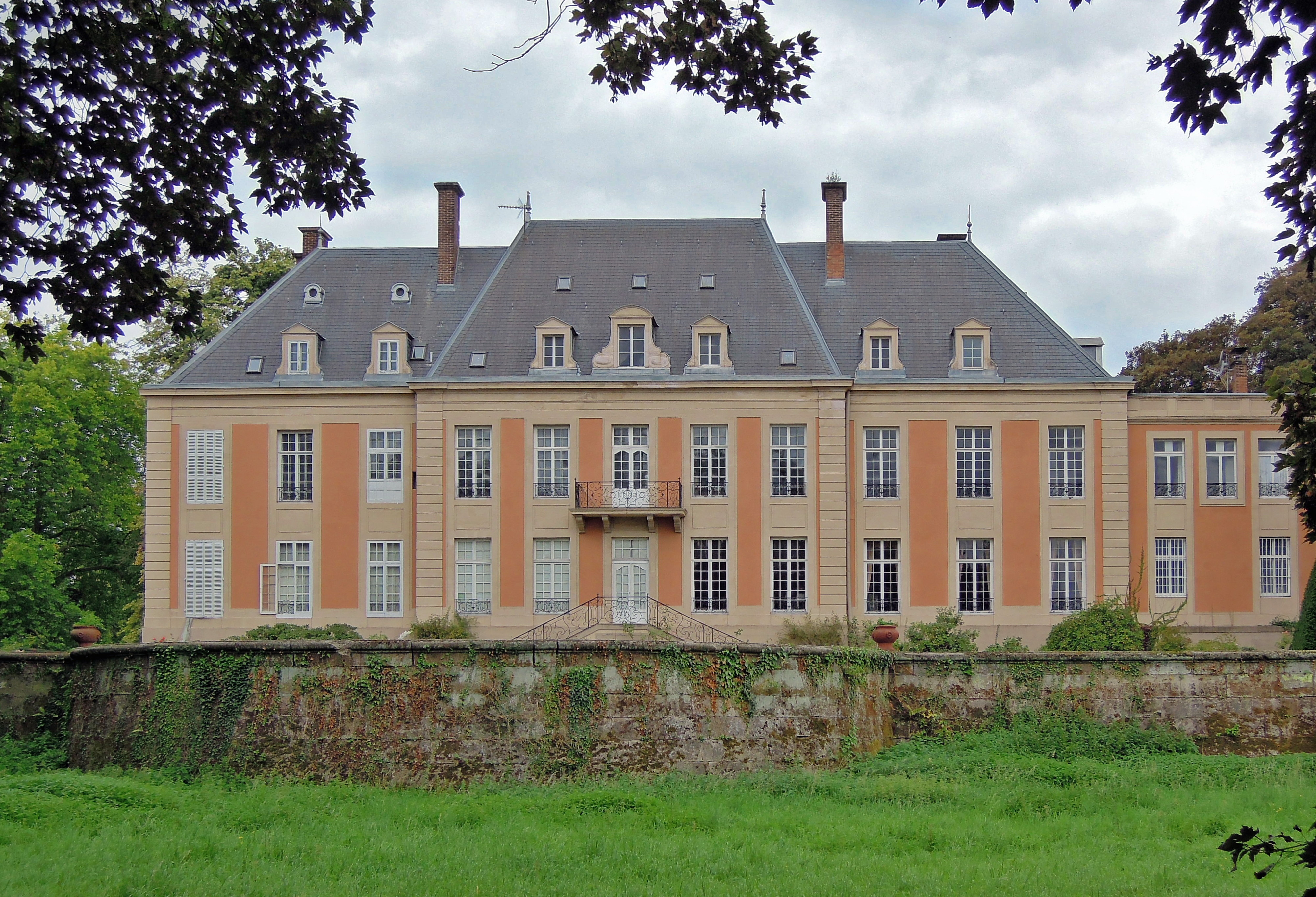 Schloss Villeroy de Galhau, Hauptstraße 63